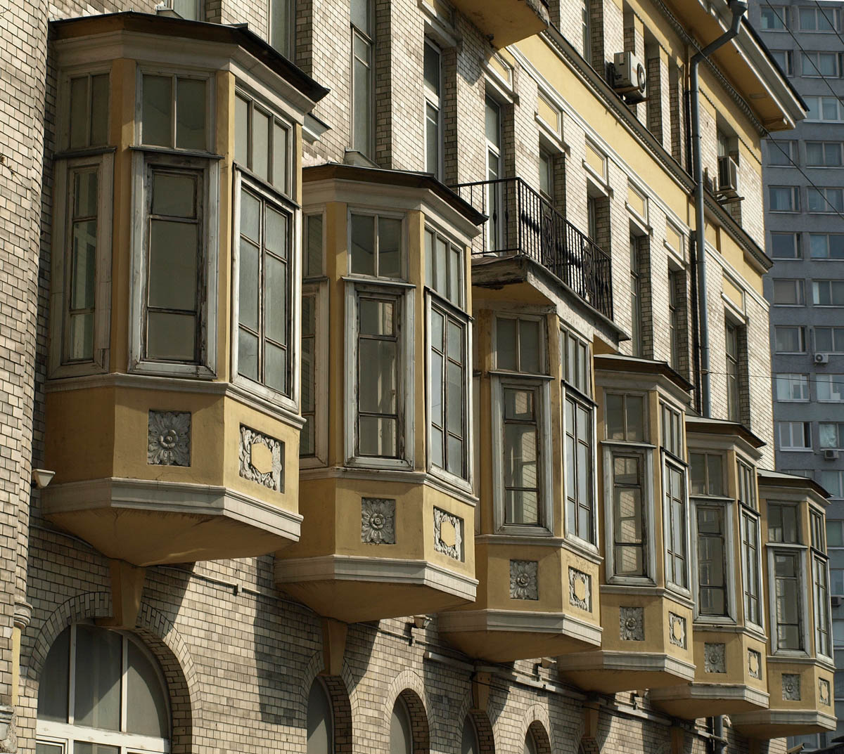 12, Bolshaya Molchanovka, Moscow